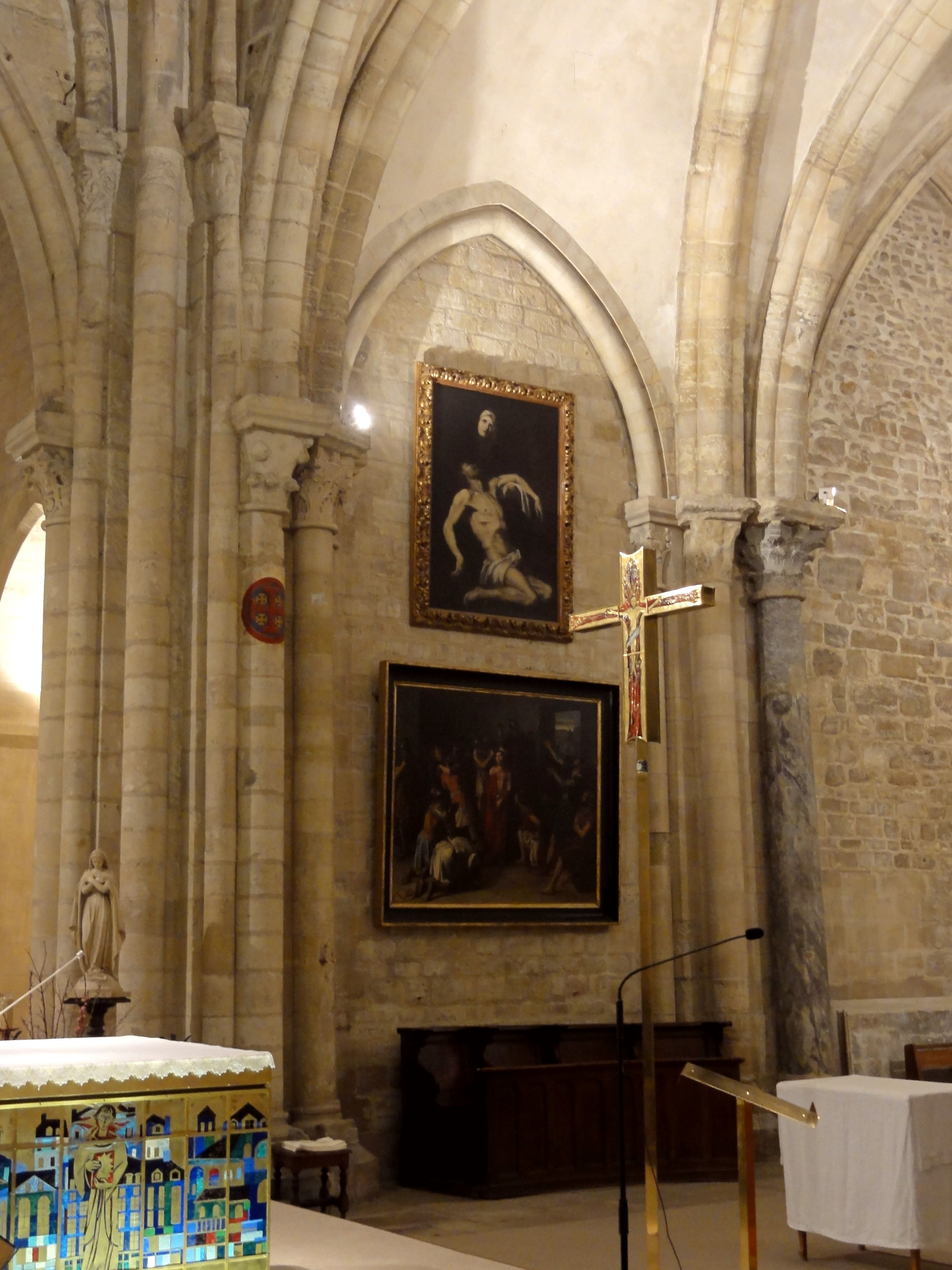 Chœur, 1ère travée, côté nord.